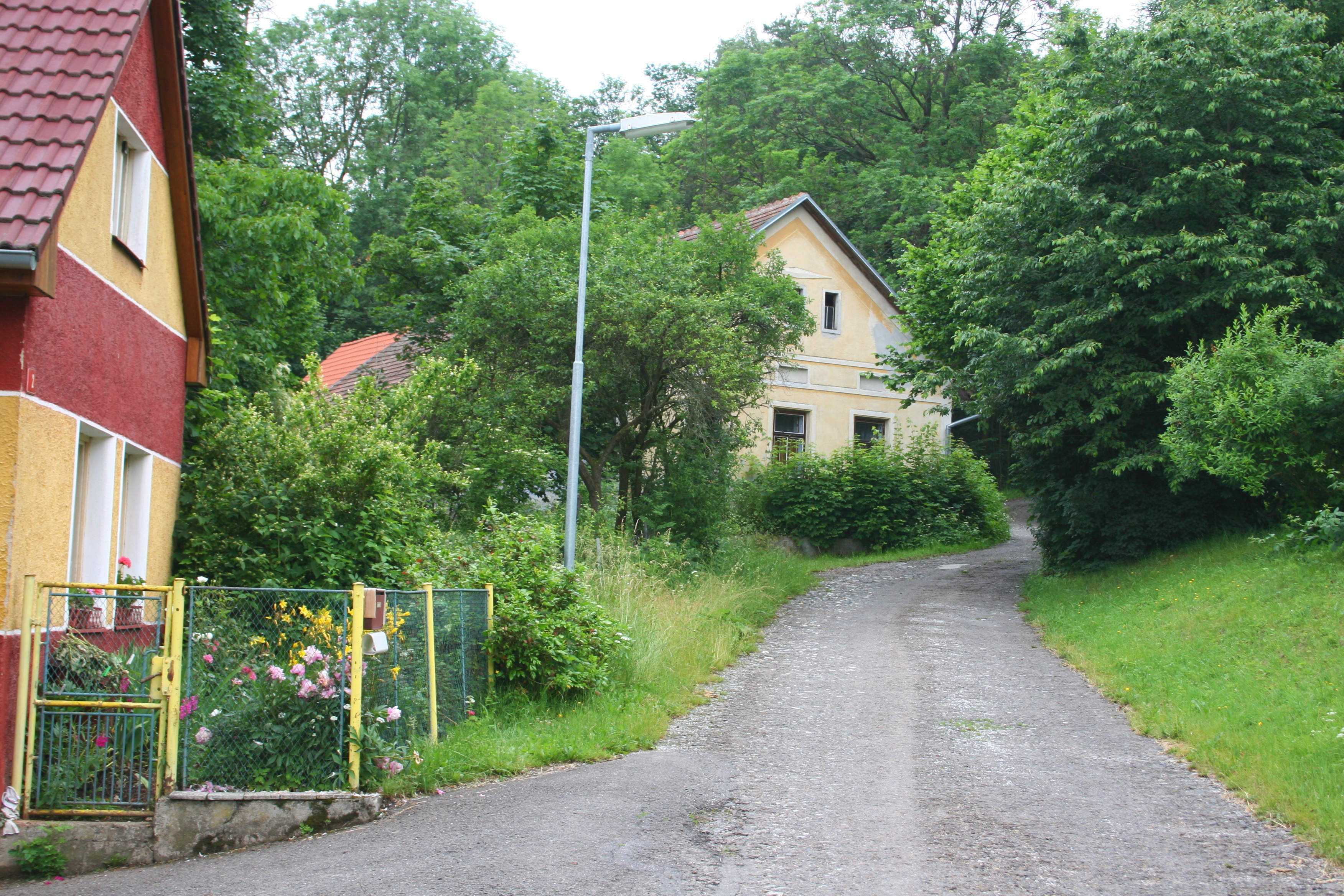 Ratibořec, Česká republika.